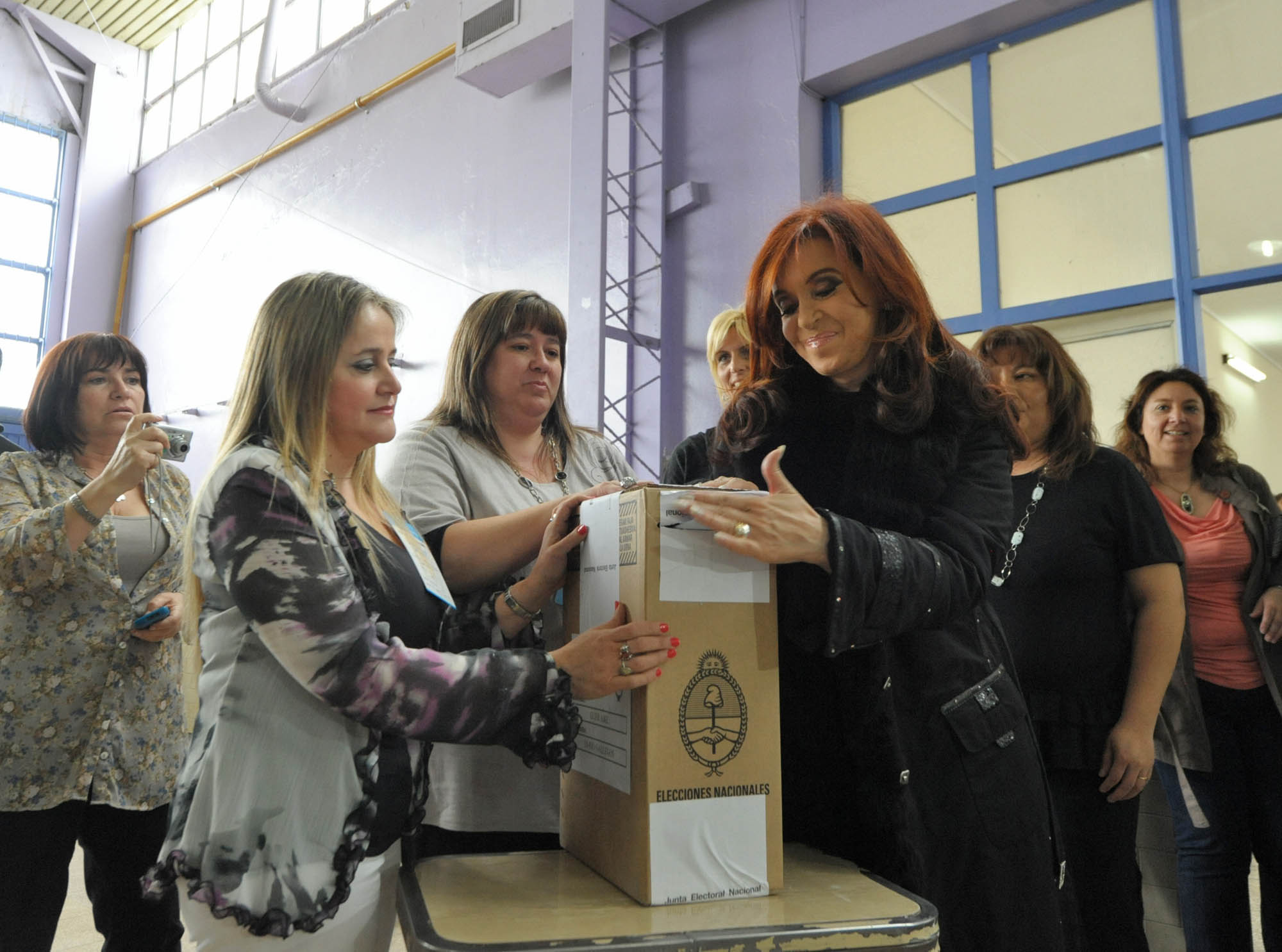 La presidenta Cristina Fernández emite su voto en la mesa 529 de la Escuela Nuestra Señora de Fátima, de la localidad de Río Gallegos, en la provincia de Santa Cruz.